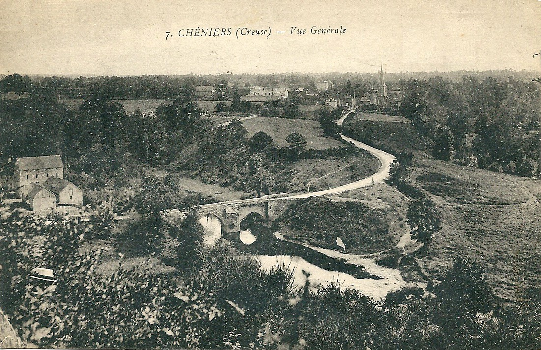 Chéniers (Creuse) - vue générale - vers 1920